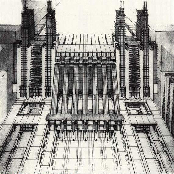 Stazione d'aeroplani e treni ferroviari con funicolari e ascensori su tre piani stradali.